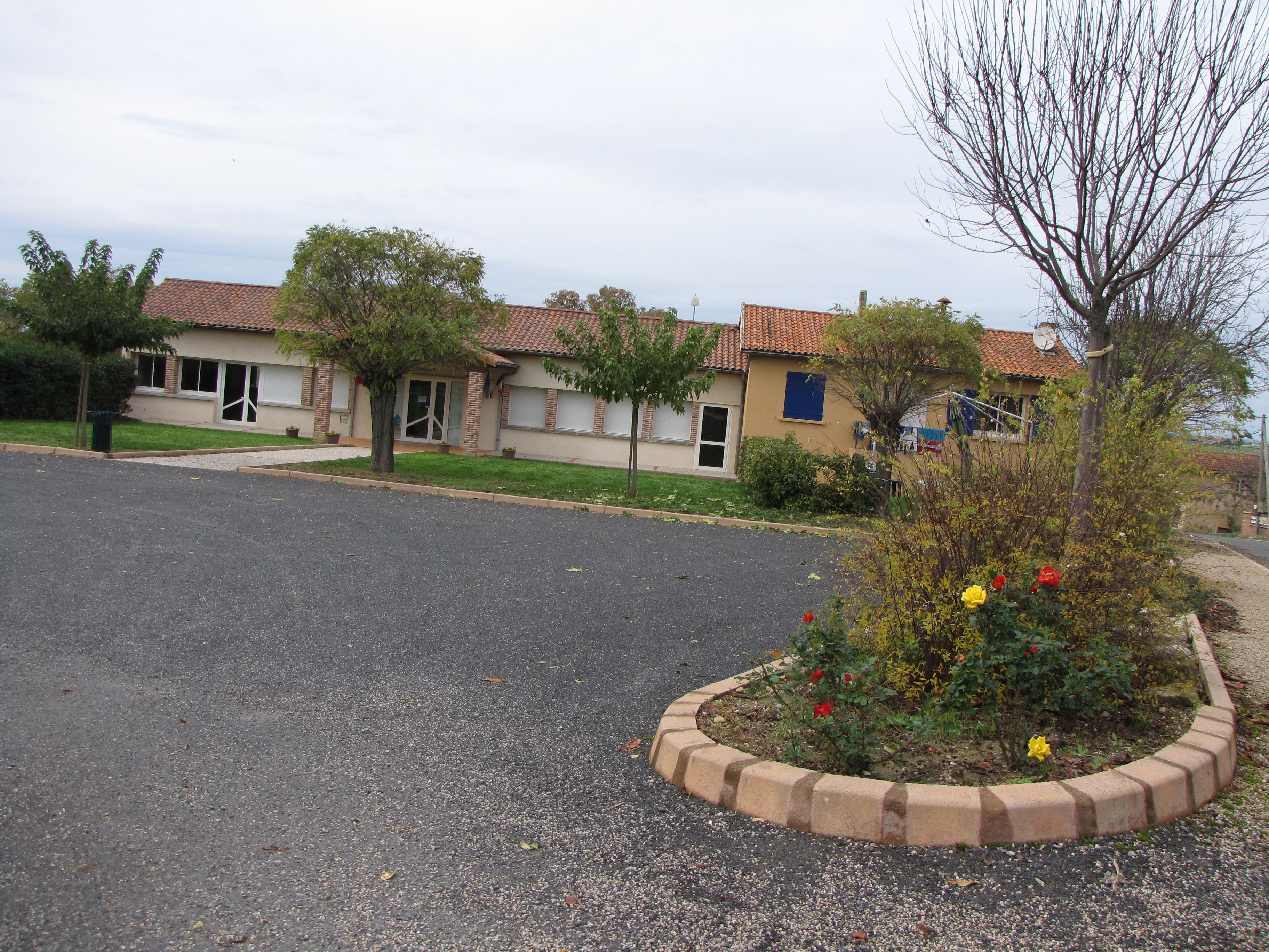 Mairie d'Aussac